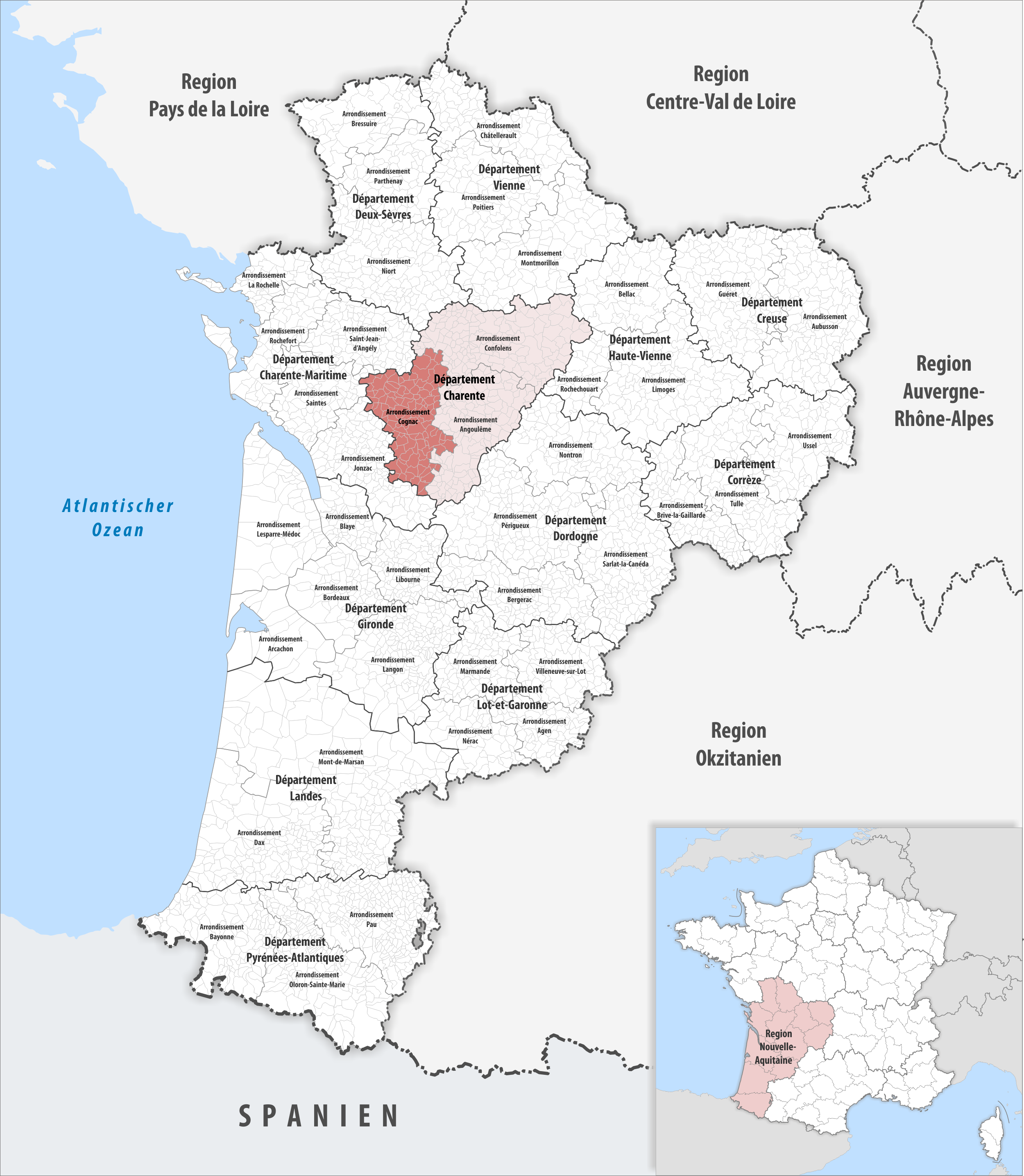 Lage des Arrondissements Cognac